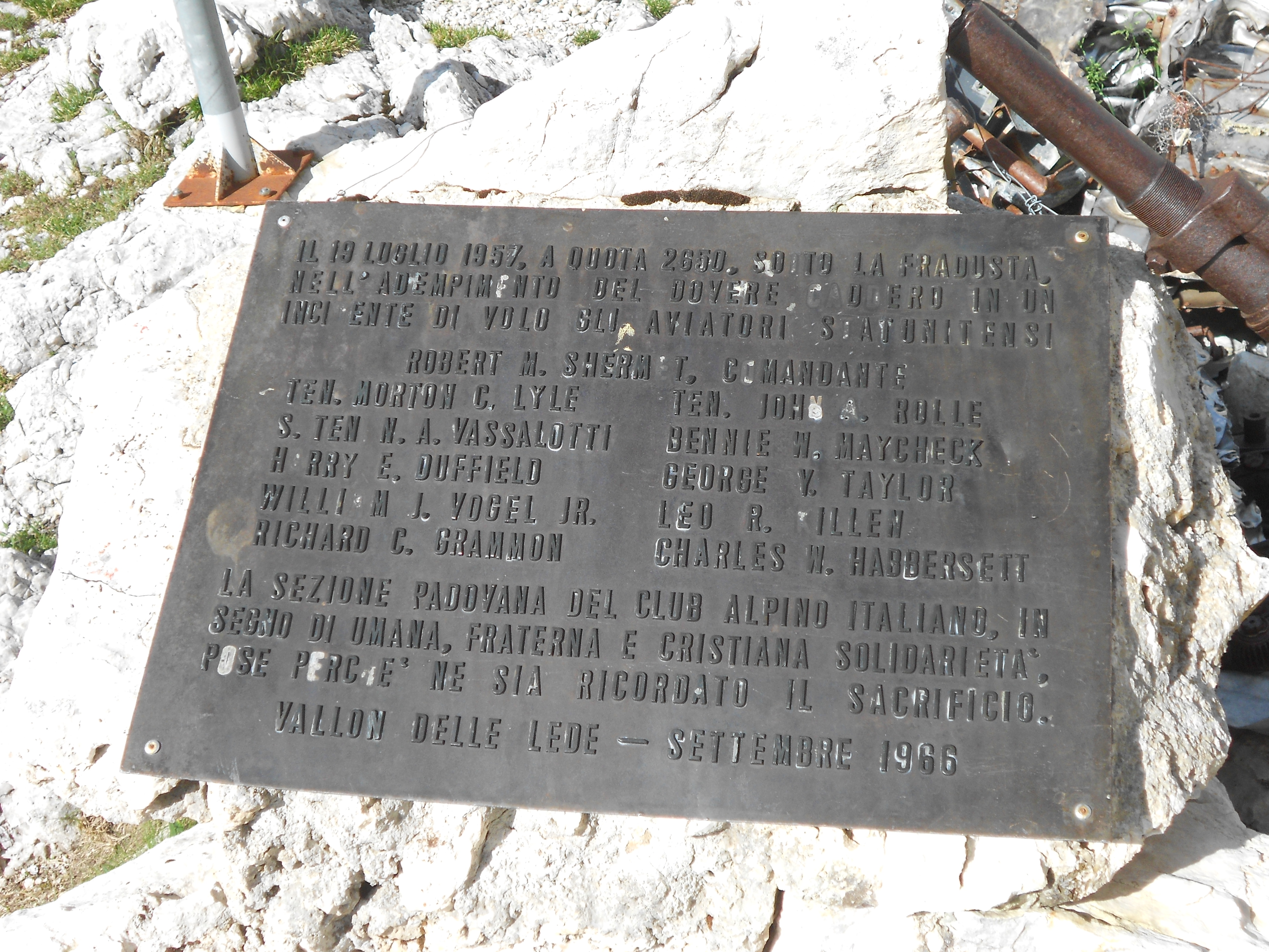 Vèneto: La targa comemorativa al bivach Minanzio (Pale de San Martin)